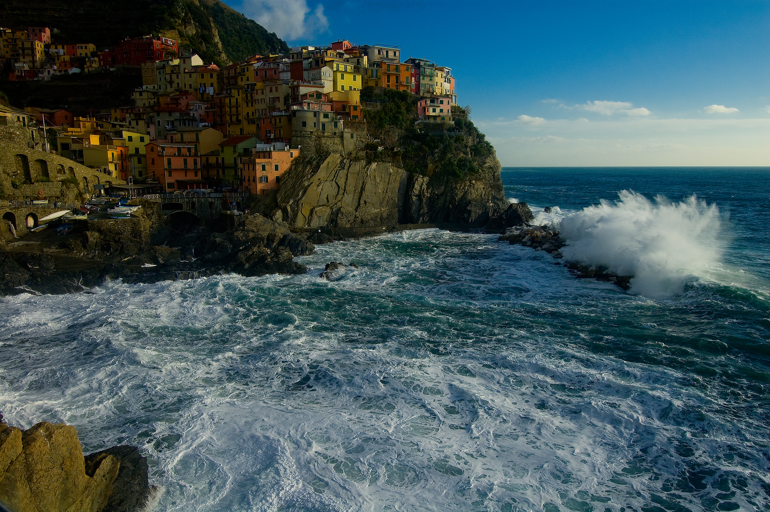 Manarola, Liguria, Italy